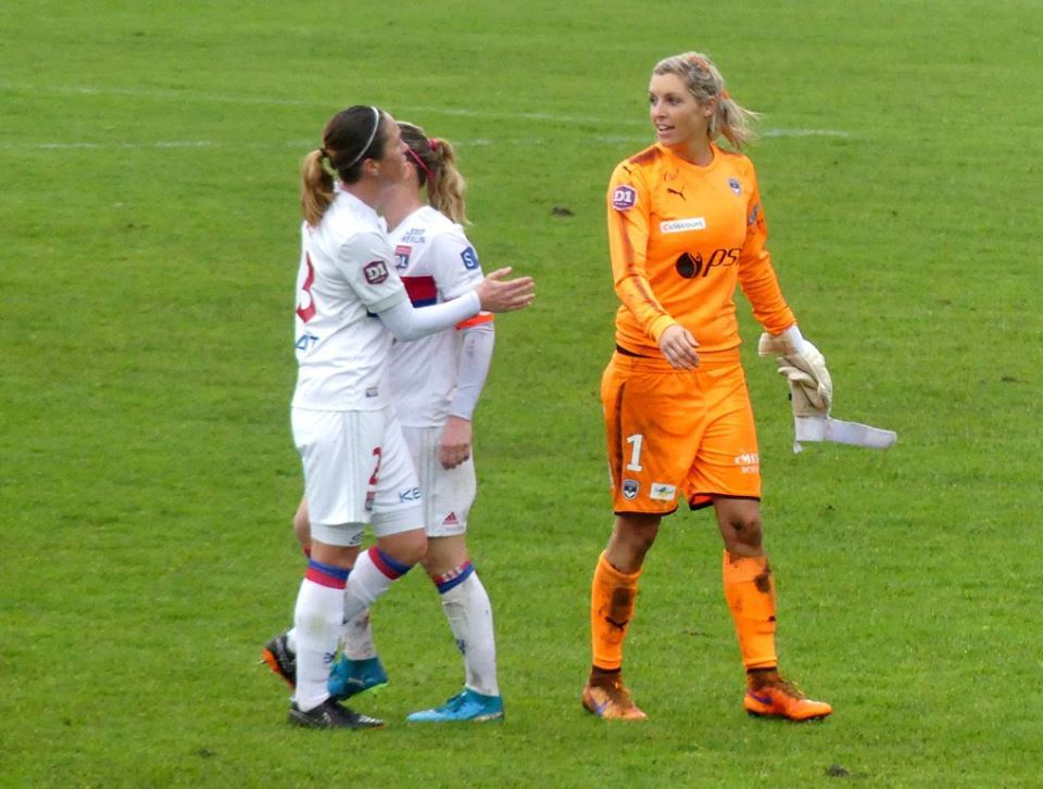 Camille Abily et Erin Nayler lors de la 15ème journée de championnat Bordeaux-OL le 18 février 2018.